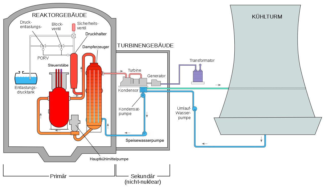 Überarbeitete Version